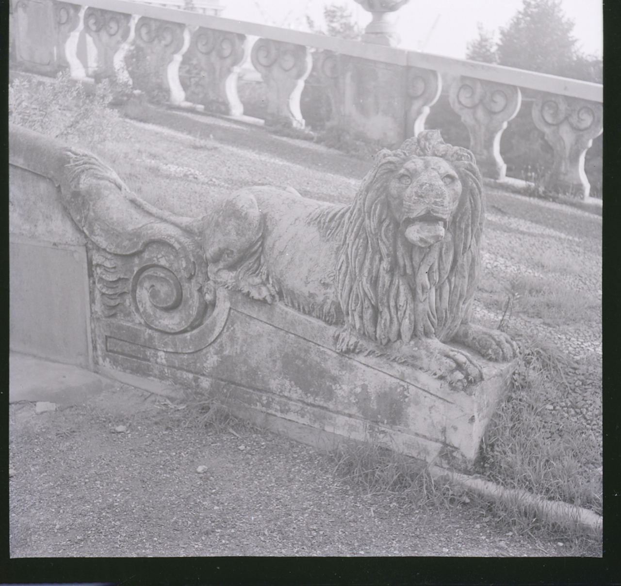 Riviera di Ponente. Genova. Sestri. Villa De Mari, Spinola detta Villa Maria. Scuola elementare e abitazioni. Esterni. Giardinoall'italiana. Statue e pavimentazione a ciottoli. Servizio fotografico : Genova, 1963 / Paolo Monti. - Buste: 5, Fototipi: 5 : Negativo b/n, gelatina bromuro d'argento/ pellicola ; 6x6. - ((Serie costituita da 5 buste sciolte di negativi identificati con i nn.: 7503, 7504, 7505, 7506, 7507. - La suddetta serie è contenuta nella scatola G7201-7600, formato 24x30. - Il negativo identificato con il numero 46397 è stato realizzato per Zodiac. - Occasione: Documentazione per la pubblicazione: Italia Nostra (a cura di), "Le ville genovesi", catalogo della mostra, Genova 1962, Genova, Comune di Genova, 1967. - Fonte: Monografia di Italia Nostra (a cura di): Le ville genovesi, catalogo della mostra, Genova 1962, Genova, Comune di Genova (1967). - Fonte: Lettera di Paolo Monti: I. Carteggi/ Genova - Enrico (1963-1966), presso Archivio Paolo Monti. Camicia con documenti dattiloscritti e manoscritti vari relativi al lavoro eseguito per Italia Nostra: preventivi, lettere, inventari. - Fonte: Agenda di Paolo Monti: Archivio fino 1-4-1961/ 31-3-1963 (1961-1963), presso Archivio Paolo Monti. - Fonte: Agenda di Paolo Monti: R 1 - Monti/ 1 aprile 1963 - 6 giugno 1964/ 6000-8193 (1963-1964), presso Archivio Paolo Monti